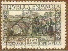 Sello español conmemorativo del tercer centenario de la muerte de Lope de Vega, con ilustración alusiva a su obra Peribáñez y el Comendador de Ocaña